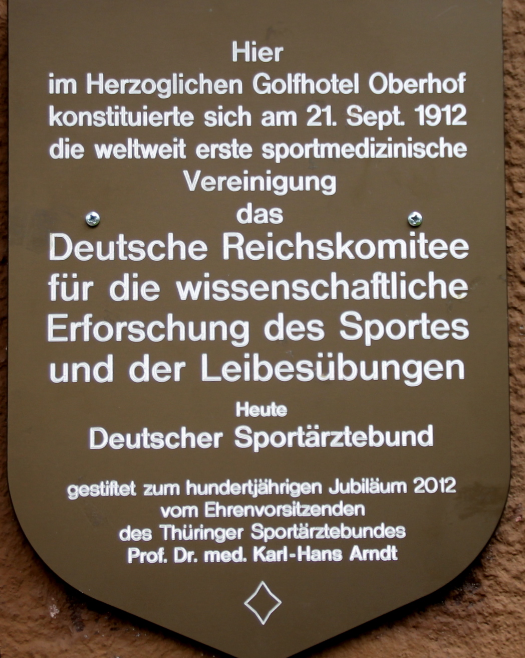 Am 19. Mai 2012 enthüllte neue Gedenktafel am Golfhotel Oberhof (Ersatz des bisherigen Provisoriums)